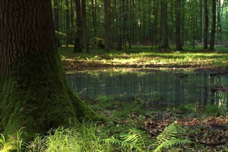 Ein temporärer Teich im Gießener Naturschutzgebiet Hangelstein